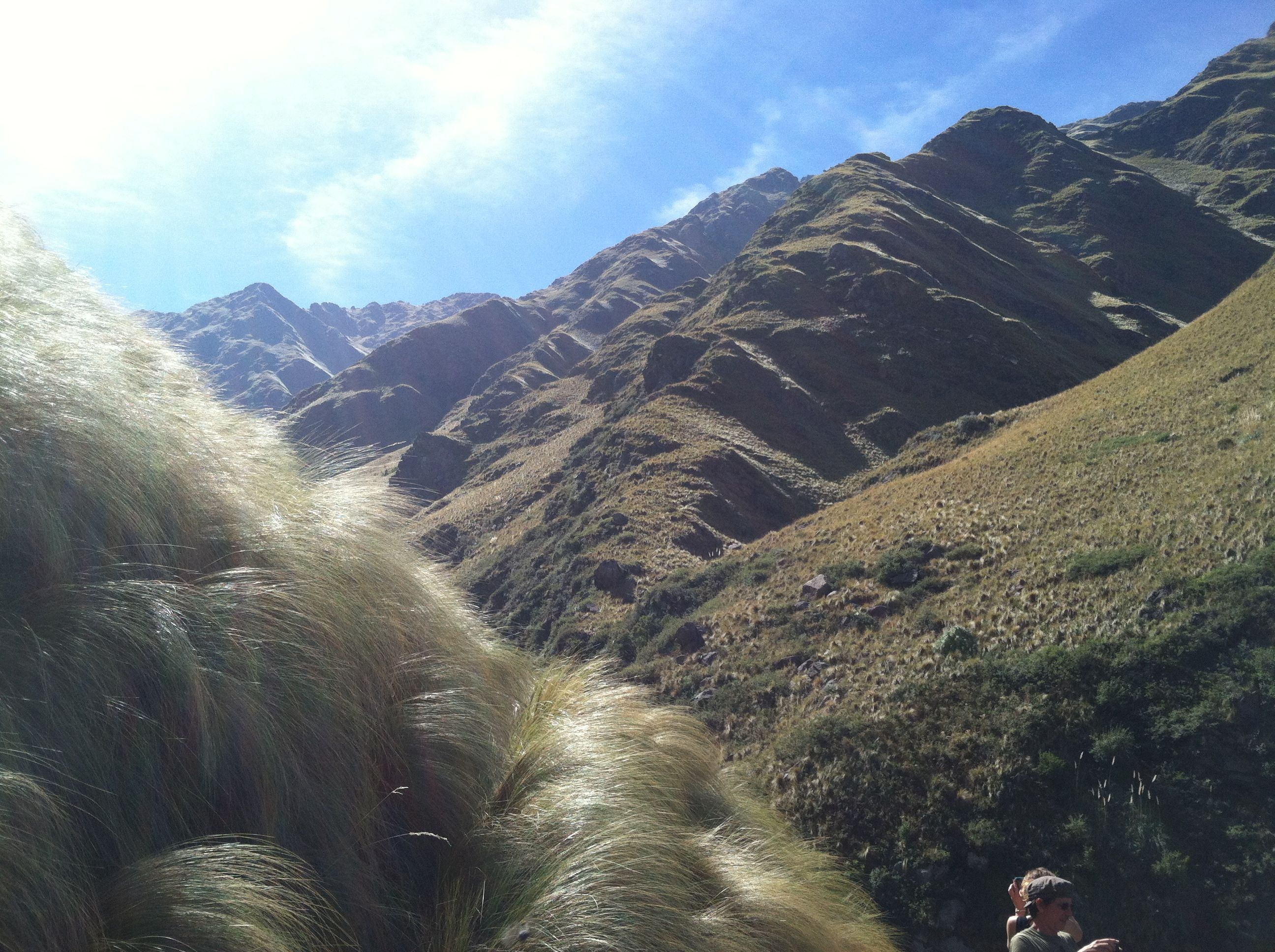 Reserva Mogote Bayo